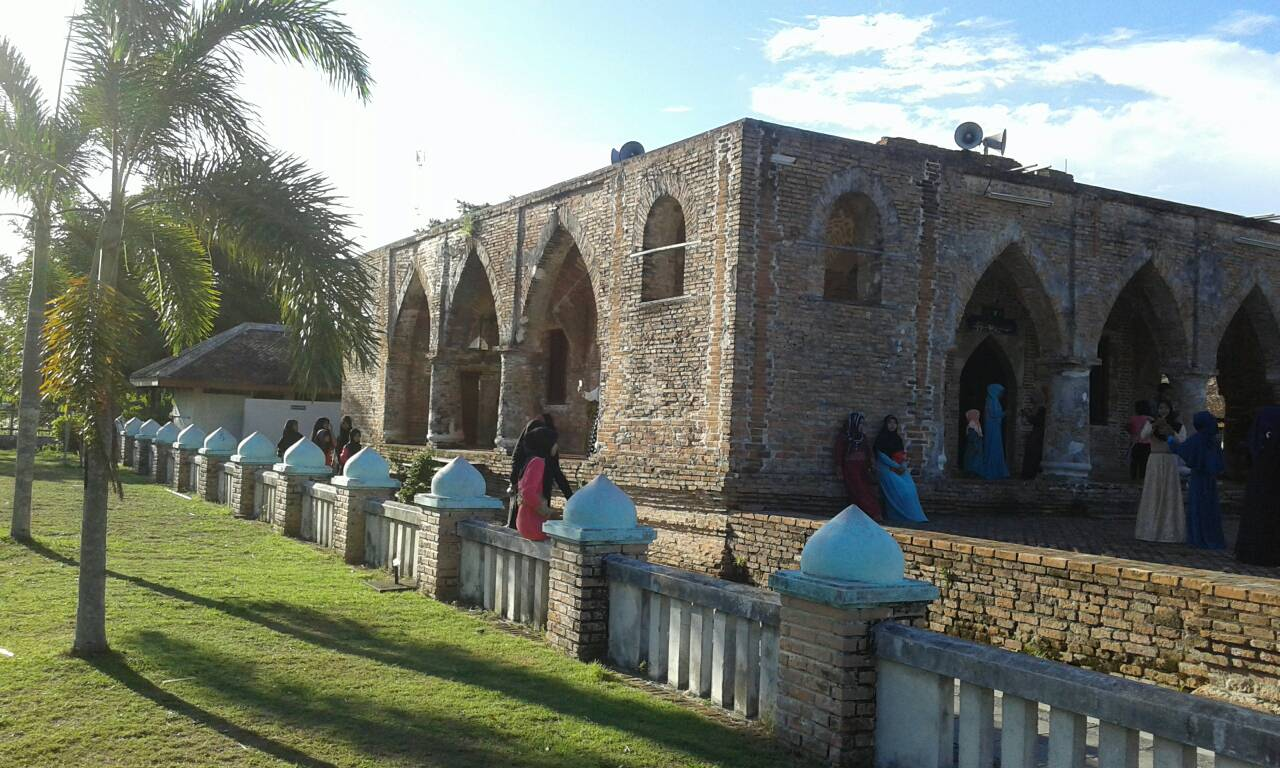 ความประทับใจที่ถ่ายภาพนี้คือ ผู้คนทั้งเด็ก ผู้ใหญ่ มาเยี่ยมชมความสวยงาม และ มาศึกษาประวัติศาสตร์ มัสยิดกรือเซะ ในวัน ฮารี ราย